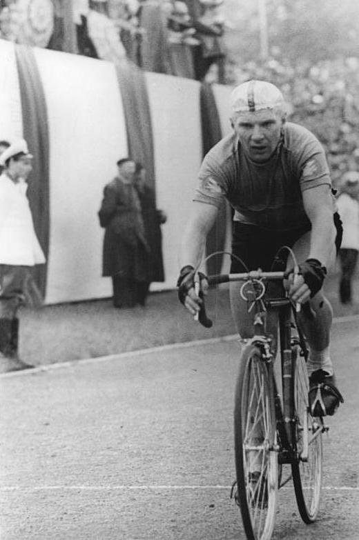 Friedensfahrt, Petrow Zentralbild Wendorf Tr-Ku 11.5.1961 XIV. Internationale Friedensfahrt Warschau-Berlin-Prag 1961.9.Etappe von Leipzig nach Karl-Marx-Stadt (mit Zeitfahren) am 11.5.1961. UBz:Gesamtsieger der 9. Etappe wurde der sowjetische Fahrer Petrow. Da er die erste Teilstrecke von Leipzig nach Halle, ein Zeitfahren über 40 km, gewonnen hatte und nur kurz hinter Melichow am Ziel in Karl-Marx-Stadt eintraf, der Gesamtsieger damit feststand.